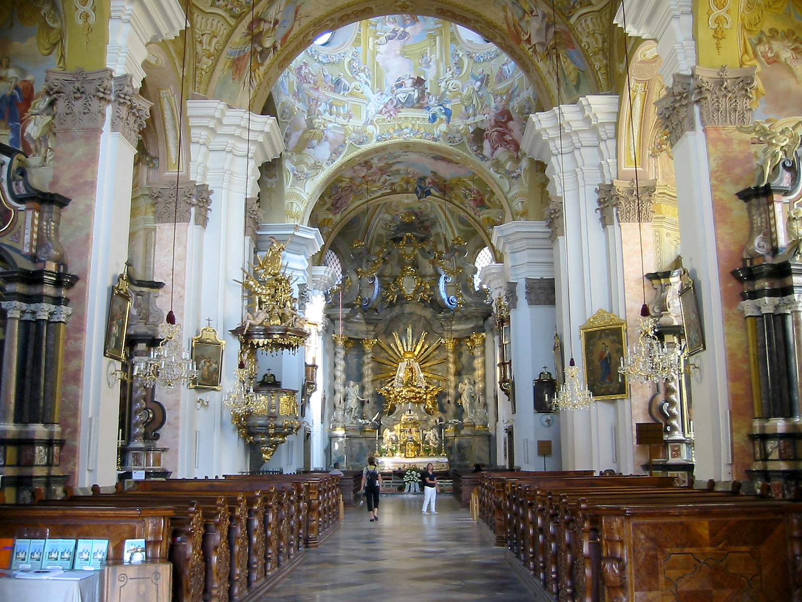 Basilika Mariae Geburt